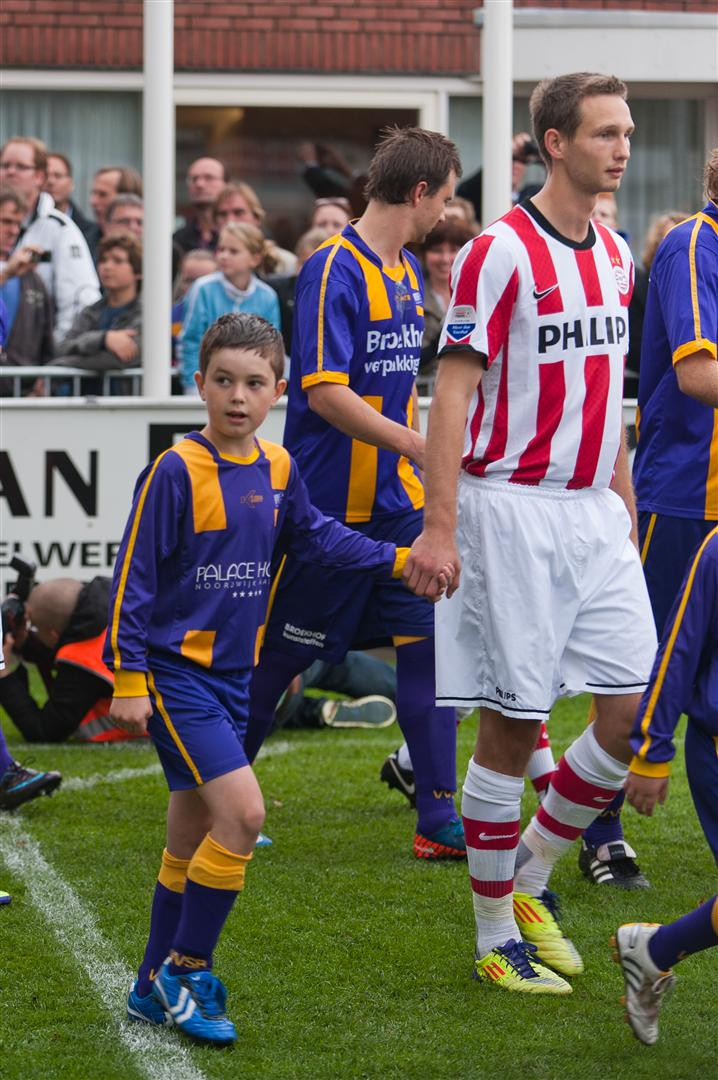 Tim Matavž